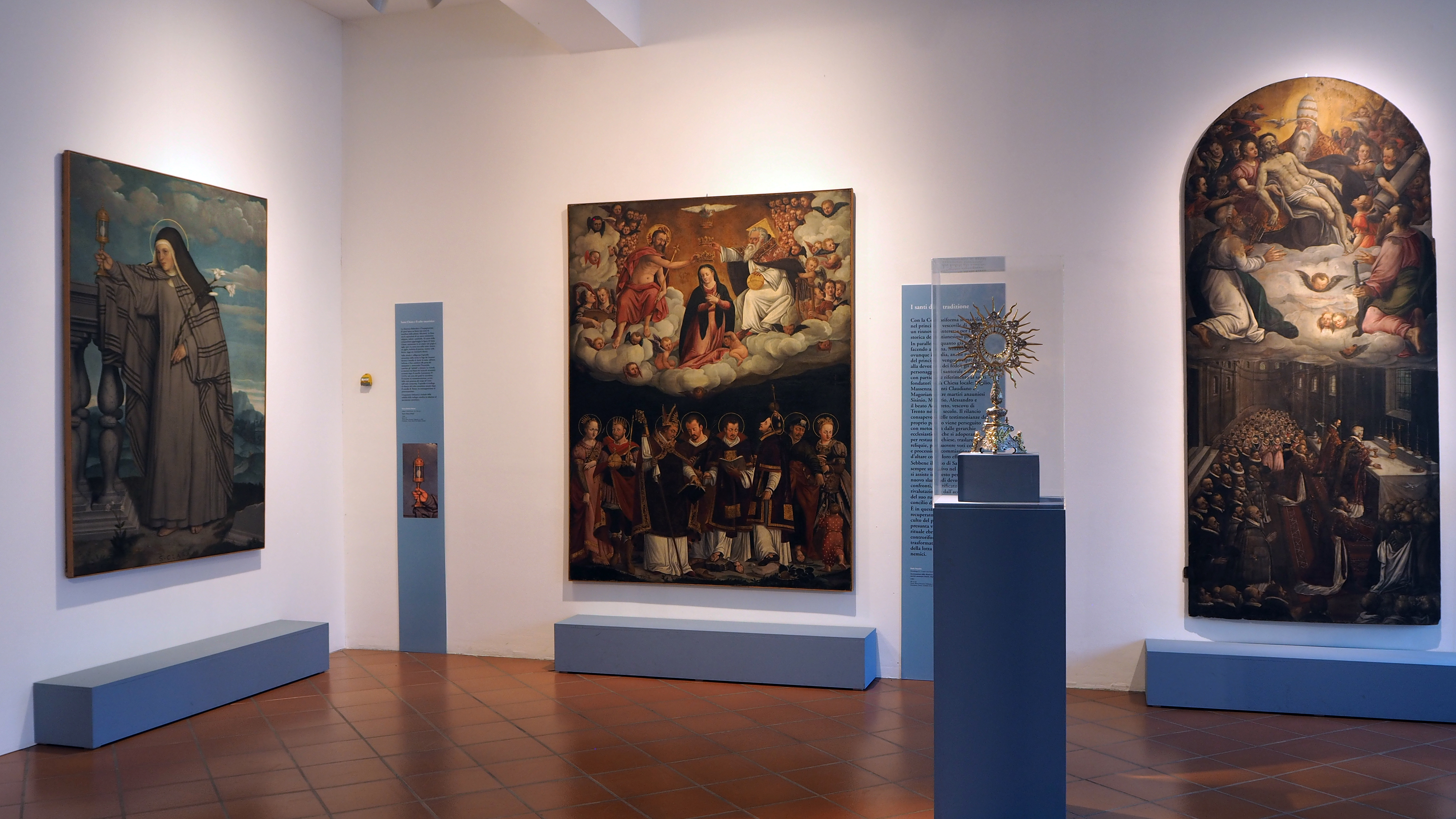 Una delle sale del Museo Diocesano Tridentino, dedicata alla pittura del XVI secolo.